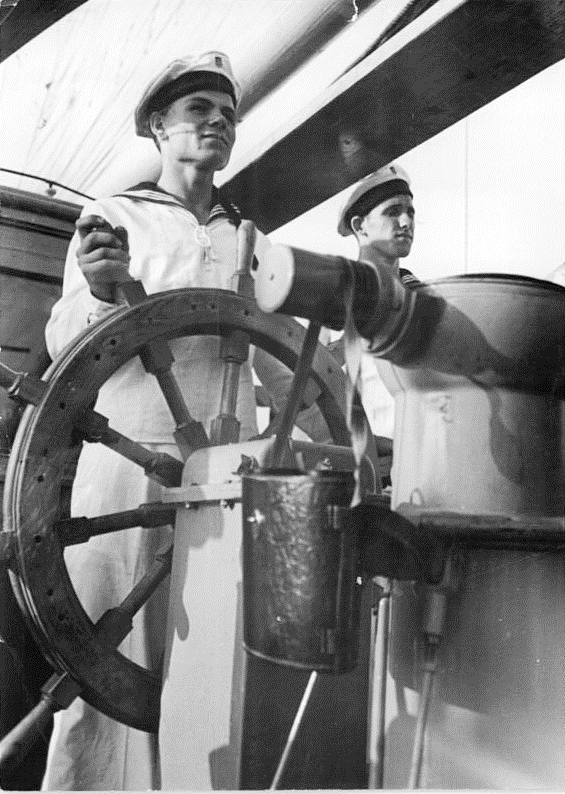 Warnemünde, Segelschulschiff "Wilhelm Pieck", Indienststellung Illus Heilig 3.8.151 FDJ-Schulschiff in Dienst gestellt. In Anwesenheit des Präsidenten Wilhelm Pieck wurde am 2.8.51 das erste Schulschiff der Freien Deutschen Jugend, das den Namen "Wilhelm Pieck" trägt, in Warnemünde in Dienst gestellt. Zum ersten Mal am Steuer.